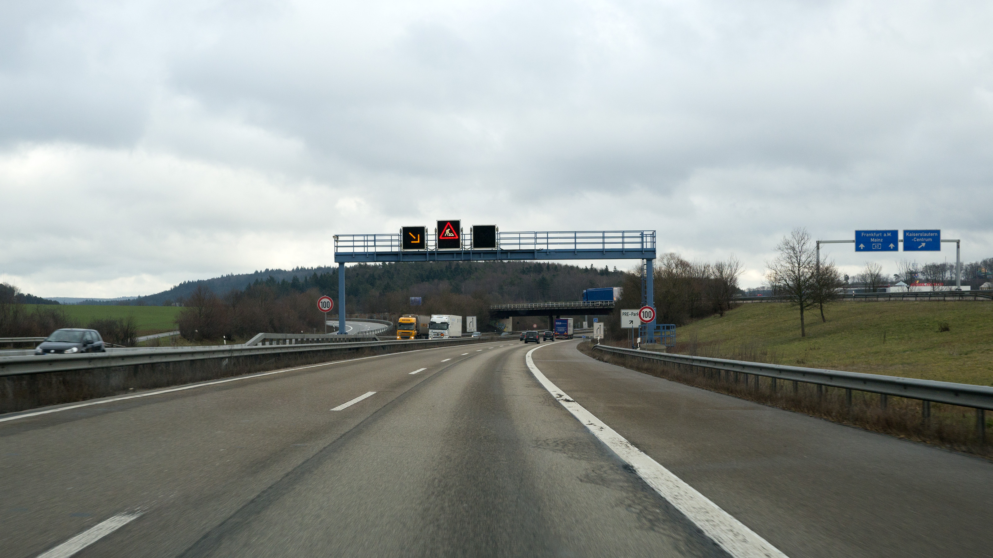 Das Autobahndreieck Kaiserslautern verbindet A6 und A63